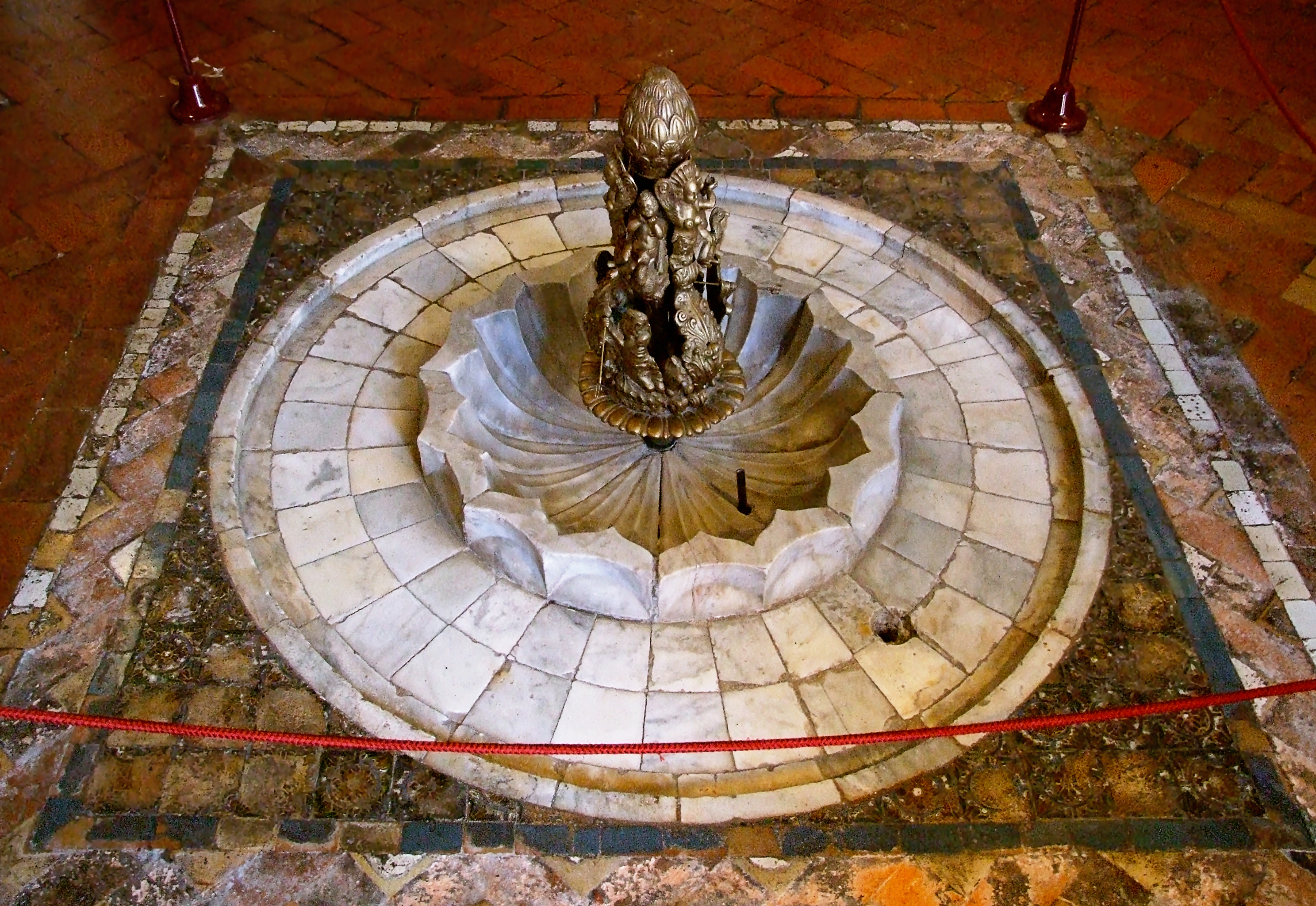 Palácio Nacional de Sintra, sala dos Arabes This file was uploaded for Wiki Loves Monuments in Portugal with the unique identifier 69856.